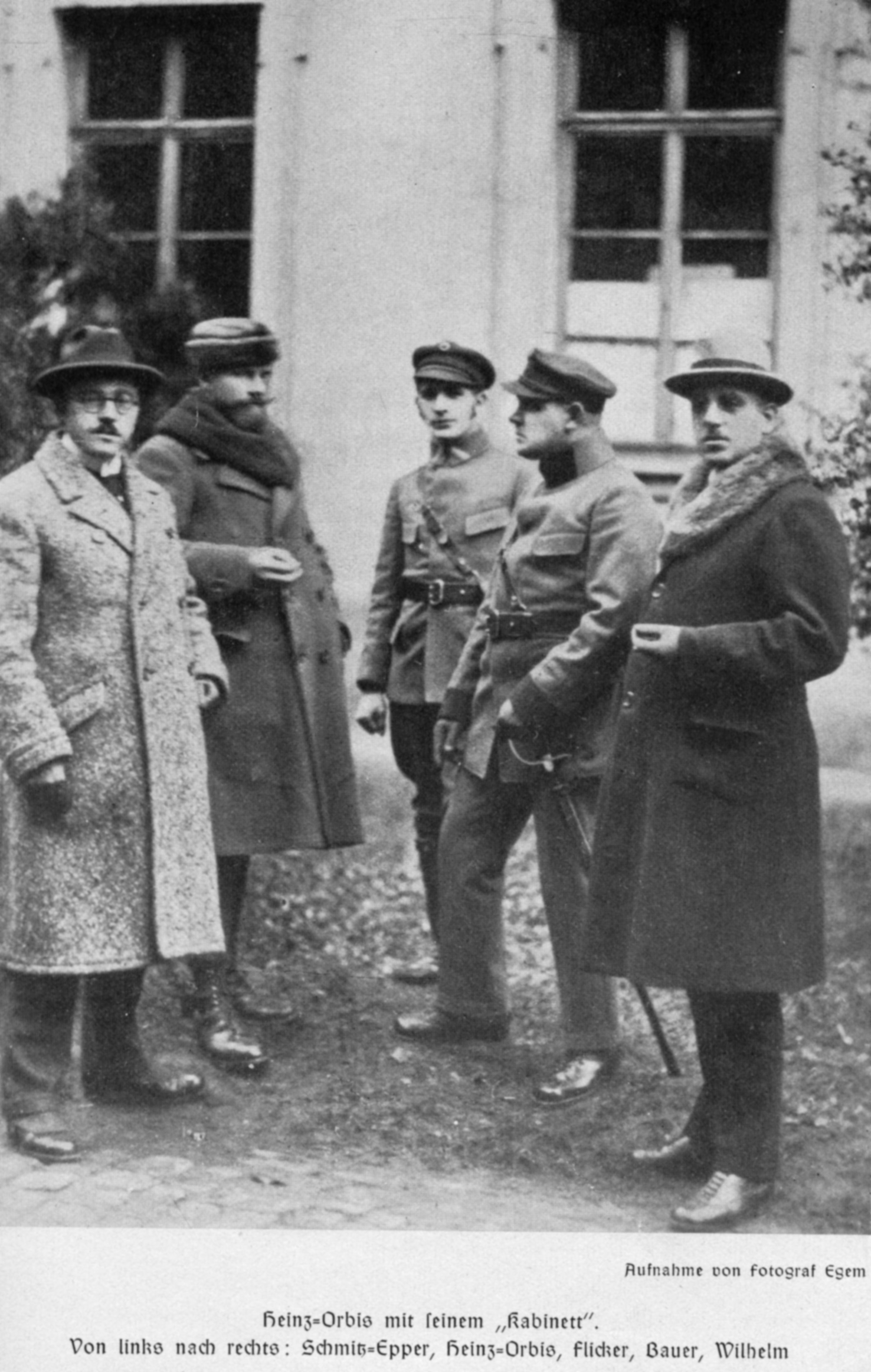 Separatisten-Präsident Franz Josef Heinz, genannt Heinz Orbis, mit einigen Kabinettsmitgliedern, 1923